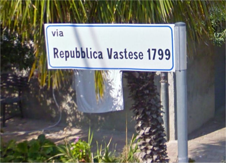 Targa di una strada della città di Vasto (CH) :Via della Repubblica Vastese 1799